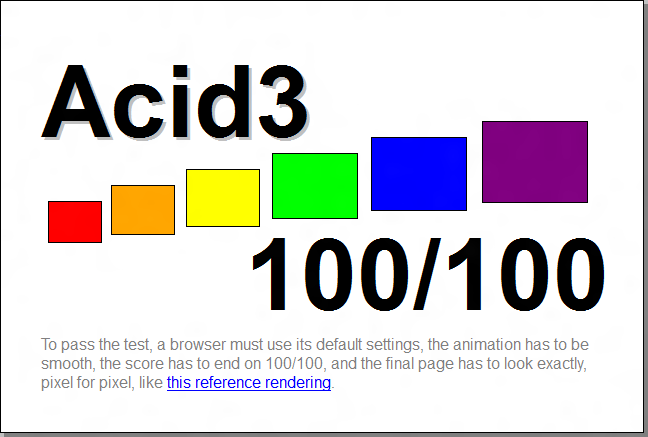 Firefox pasando la prueba Acid3